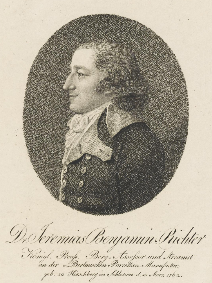 Portrait von Jeremias Benjamin Richter (1762 - 1807) Stich in Punktiermanier, 135 x 90 mm (Platte); 155 x 110 mm (Blatt) Leipzig, Universitätsbibliothek Leipzig, Porträtstichsammlung, Inventar-Nr. 42/116